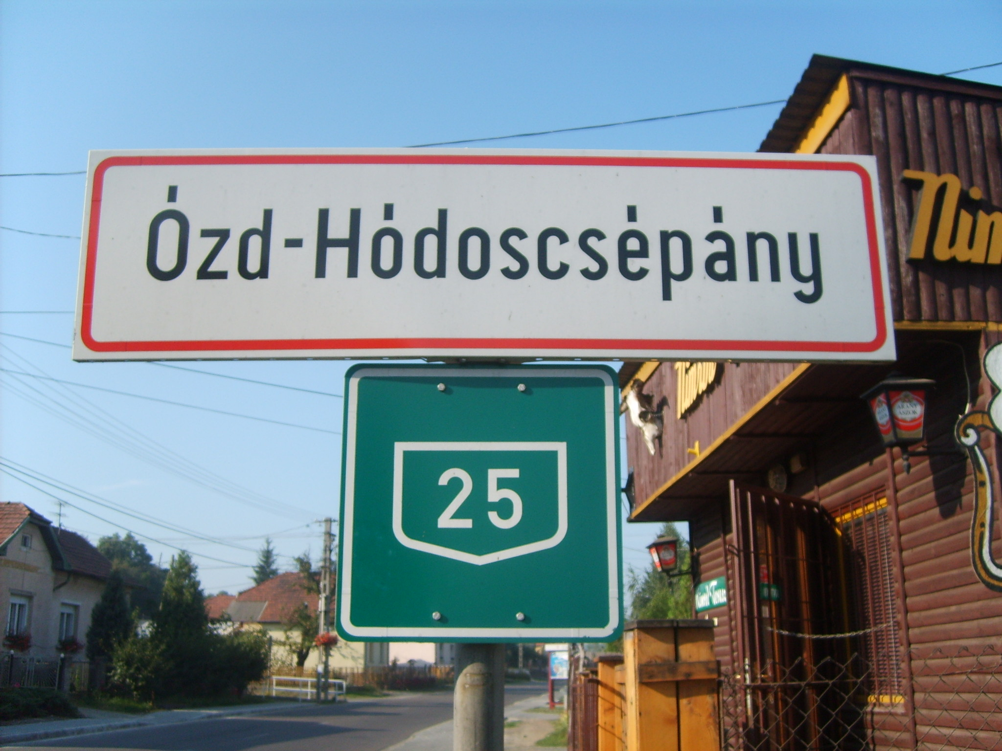 Hódoscsépány (Ózd)